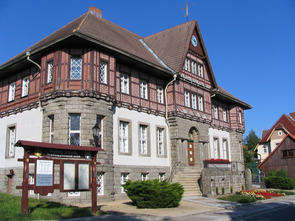 Rathaus von Schierke, selbst photographiert am 6.09.2005 um 16.51.